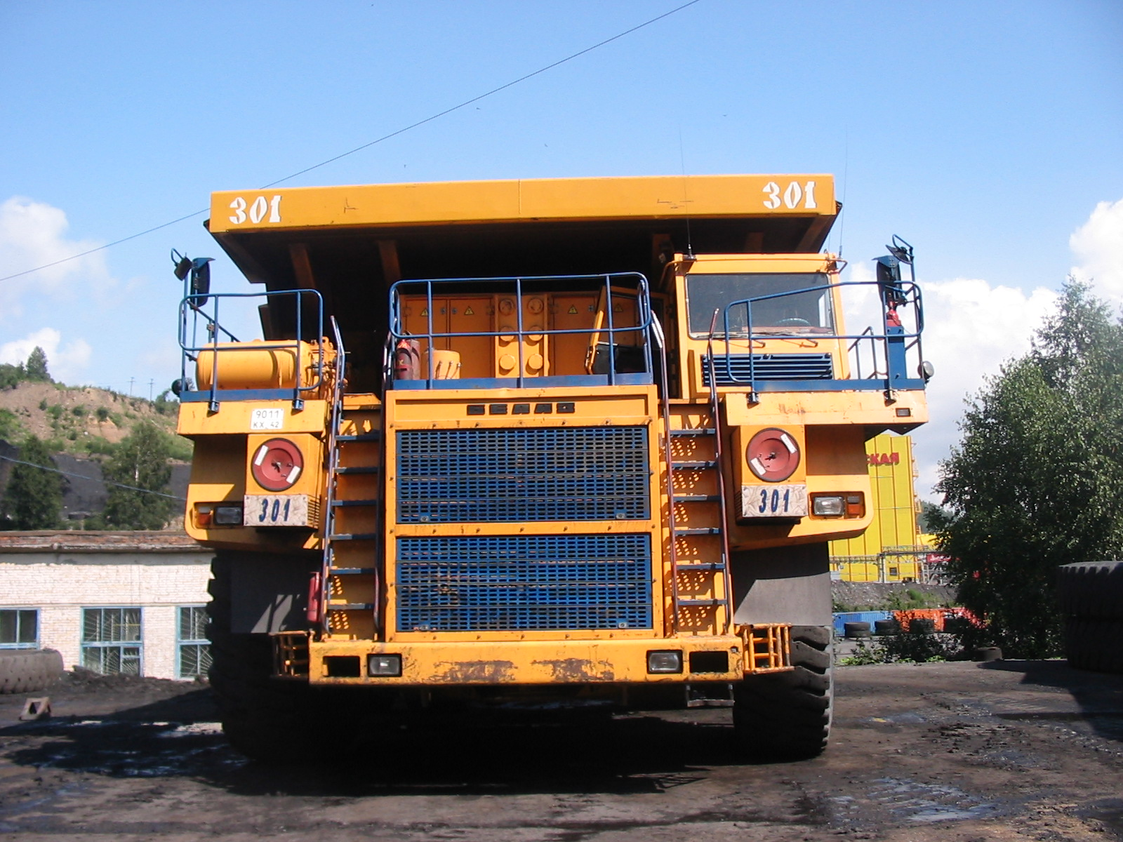 Карьерные самосвалы БелАЗ-7513, БелАЗ-75131 грузоподъемностью 130-136 тонн с трансмиссией переменно-переменного тока.